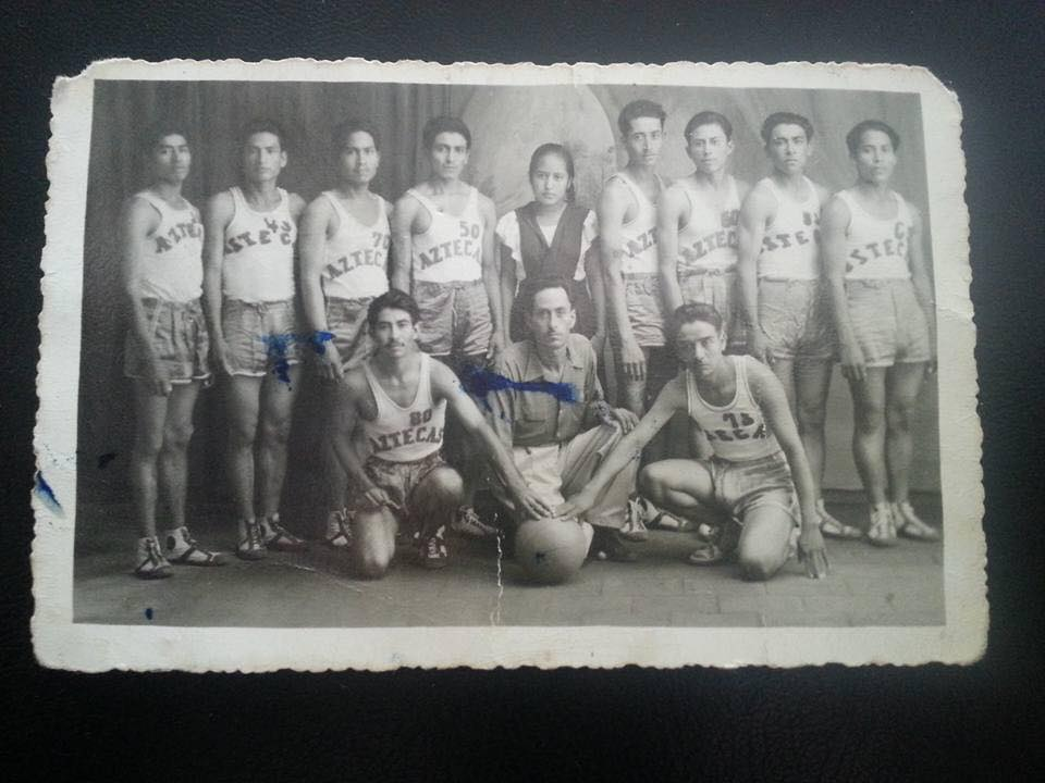 Equipo de Basquetbol Aztecas 1948